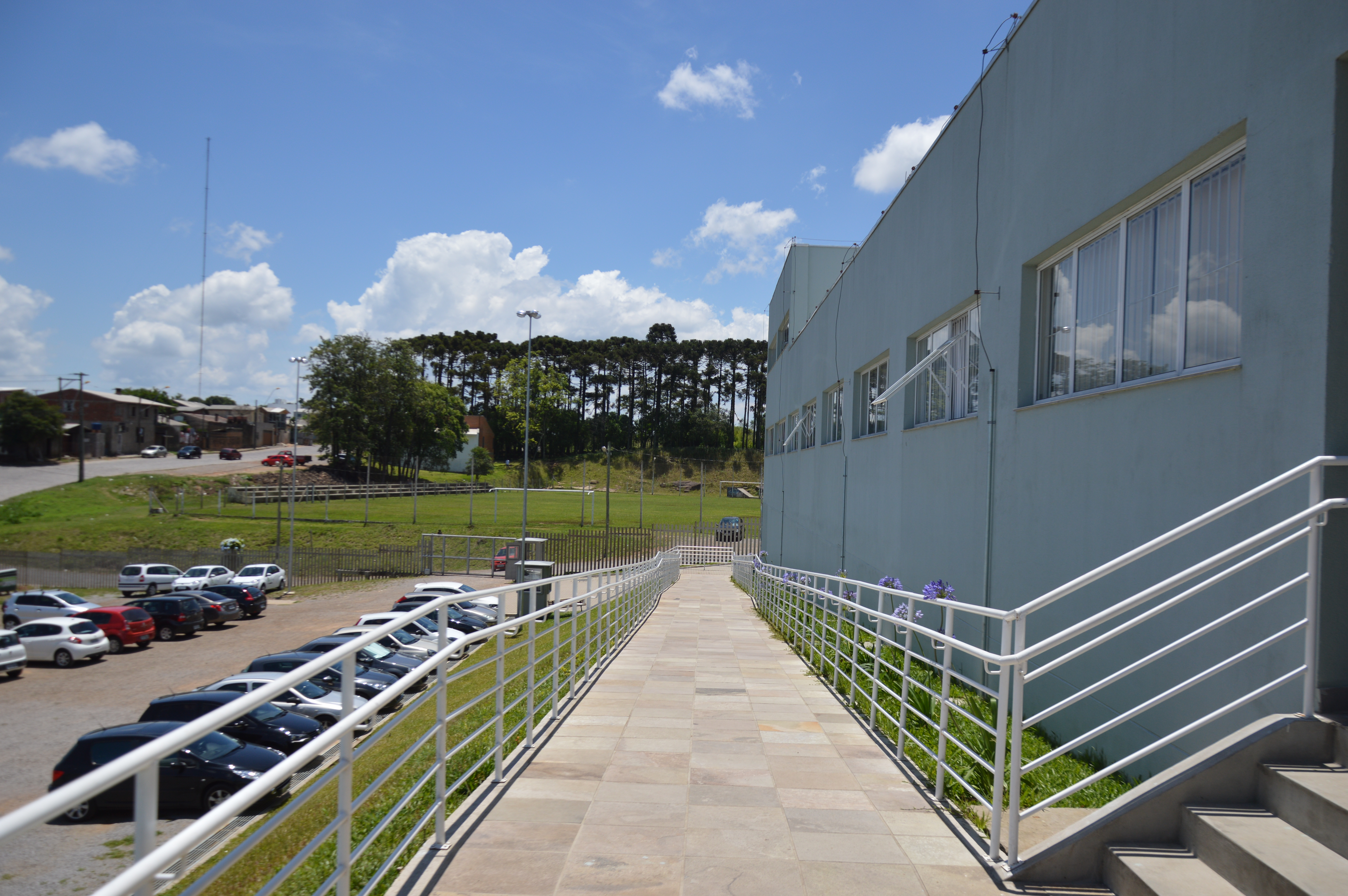 Rampa do bloco A4 do Campus Caxias do Sul -Instituto Federal de Educação, Ciência e Tecnologia do Rio Grande do Sul